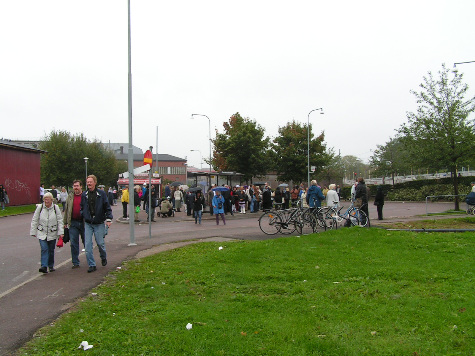 Gamlestadstorget bus station